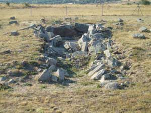 Dolmen del Alto de la Tejera (Carrascosa de la Sierra, Soria)